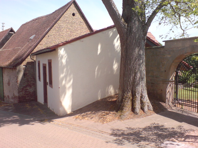 Die "Lehr" in Bolanden-Weierhof (ehemaliger mennonitischer Versammlungsraum bzw. Kirche)